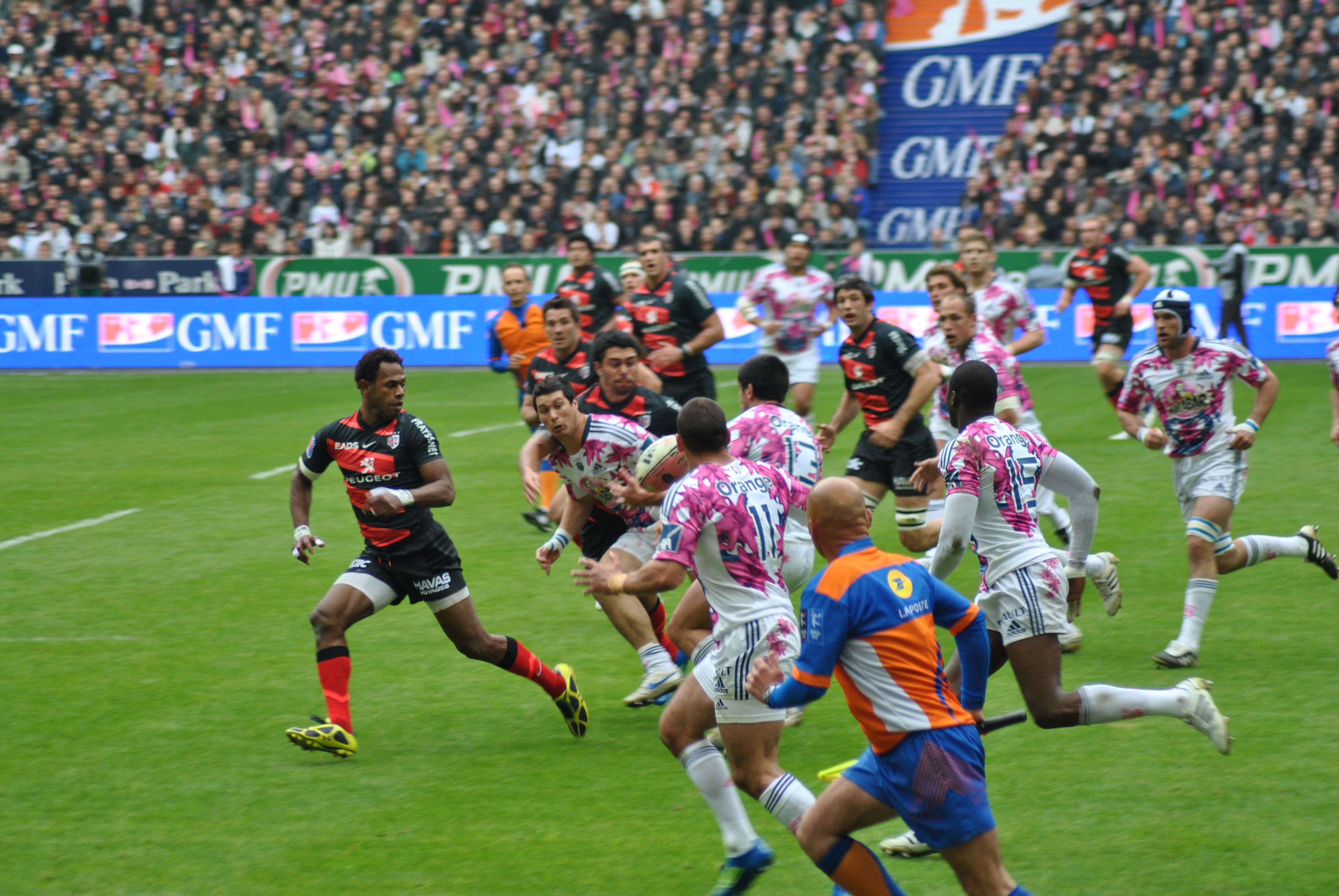 Top14 Stade français contre Stade toulousain le 30 mars 2012